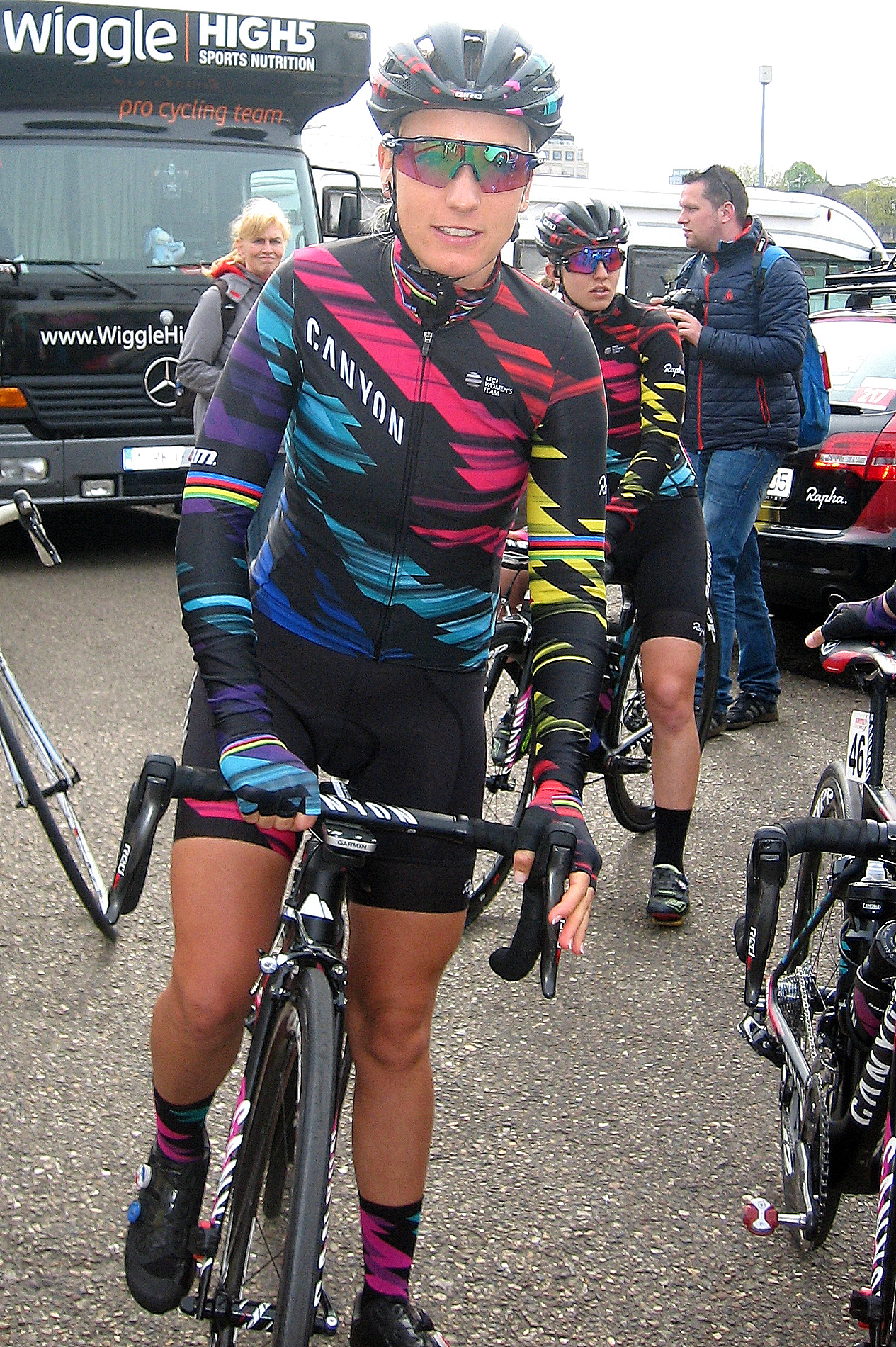 Start van de Amstel Gold Race Ladies Edition 2017 in Maastricht.